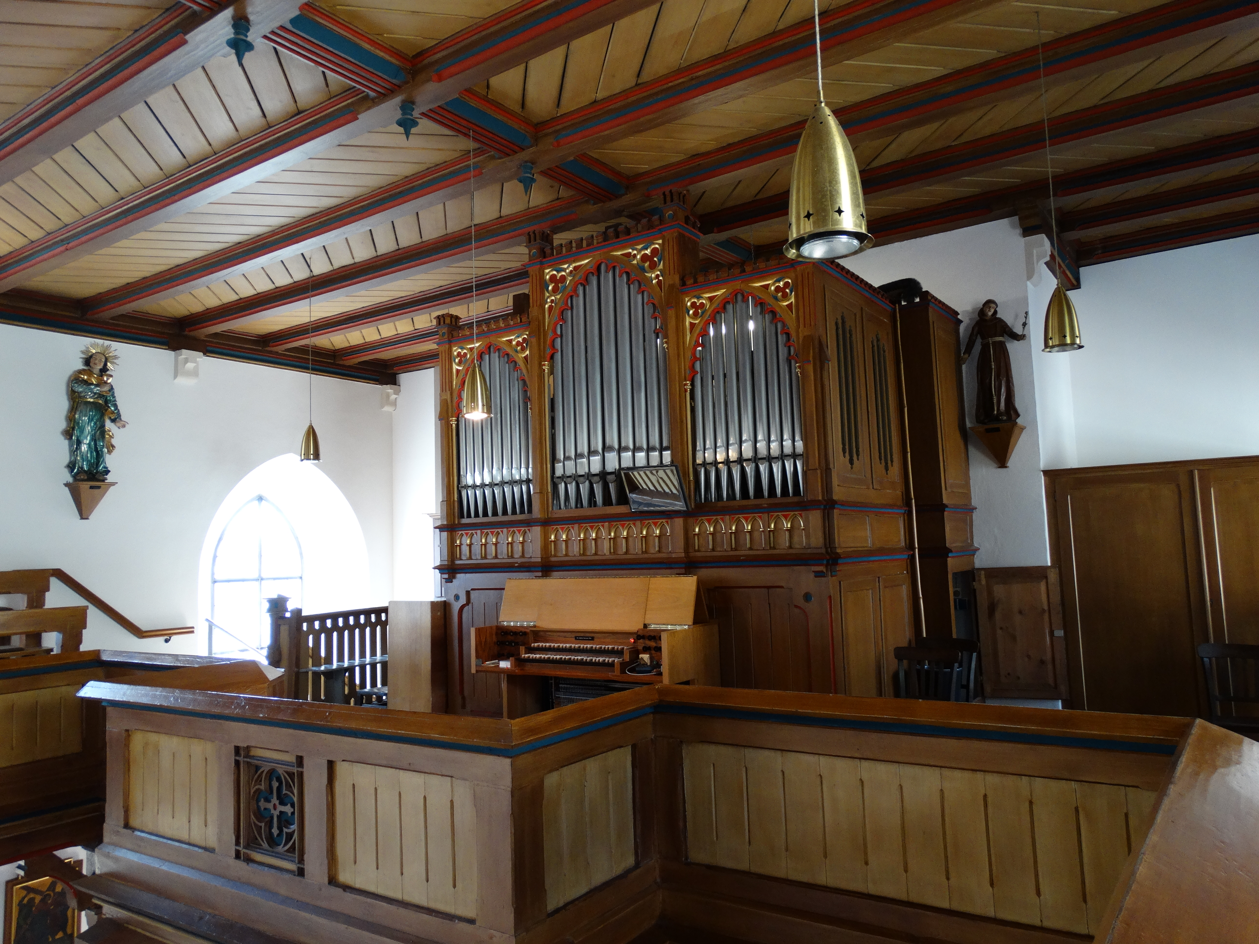 Kirche St. Jakobus der Ältere Enchenreuth im Dekanat Hof, Orgelempore